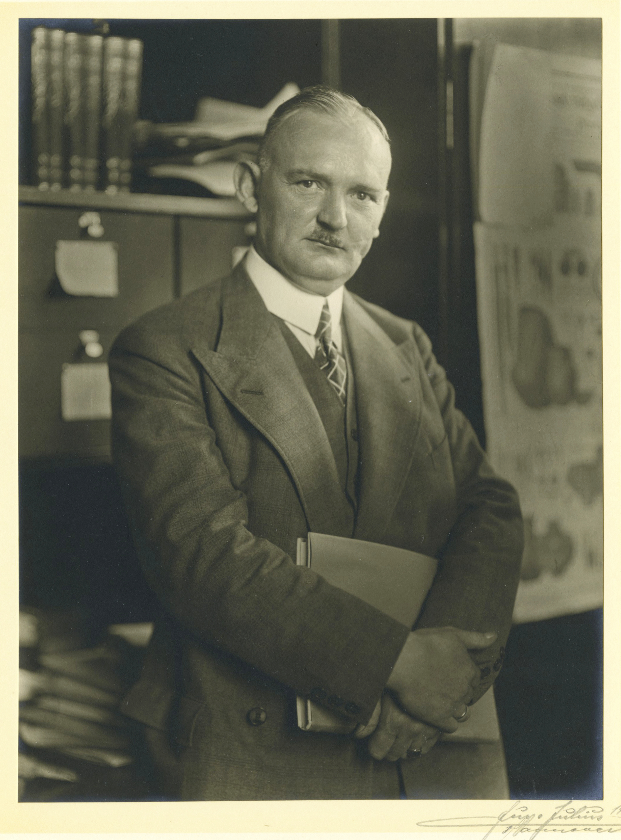 Foto des Archäologen Karl Hermann Jacob-Friesen aus dem Jahr 1930, in seinem Arbeitszimmer.